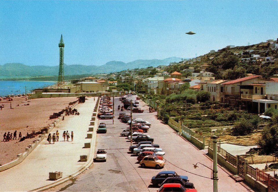 Alcamo Marina - Torre Alkamar in zona Battigia